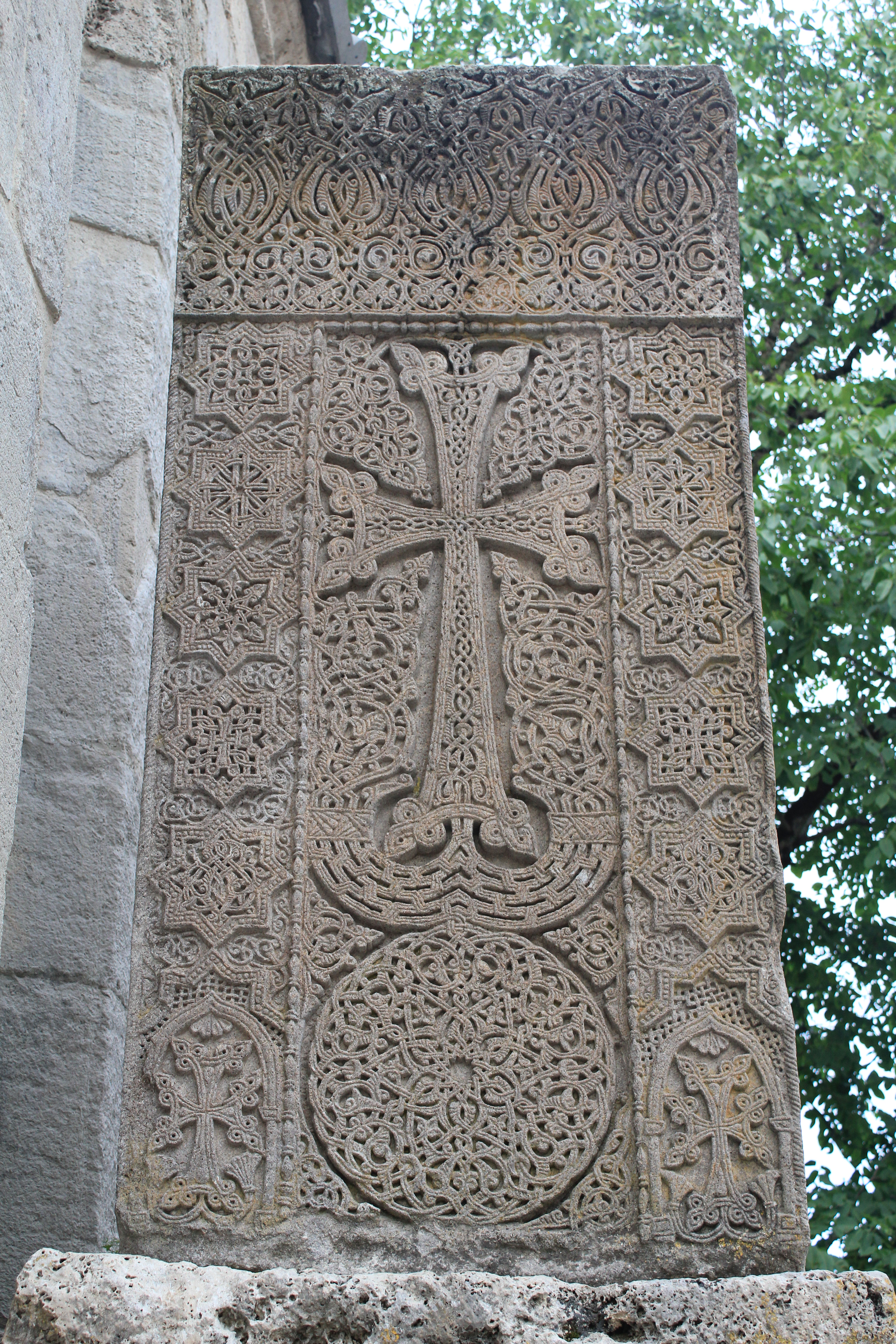 Хачкар в монастыре Агарцин